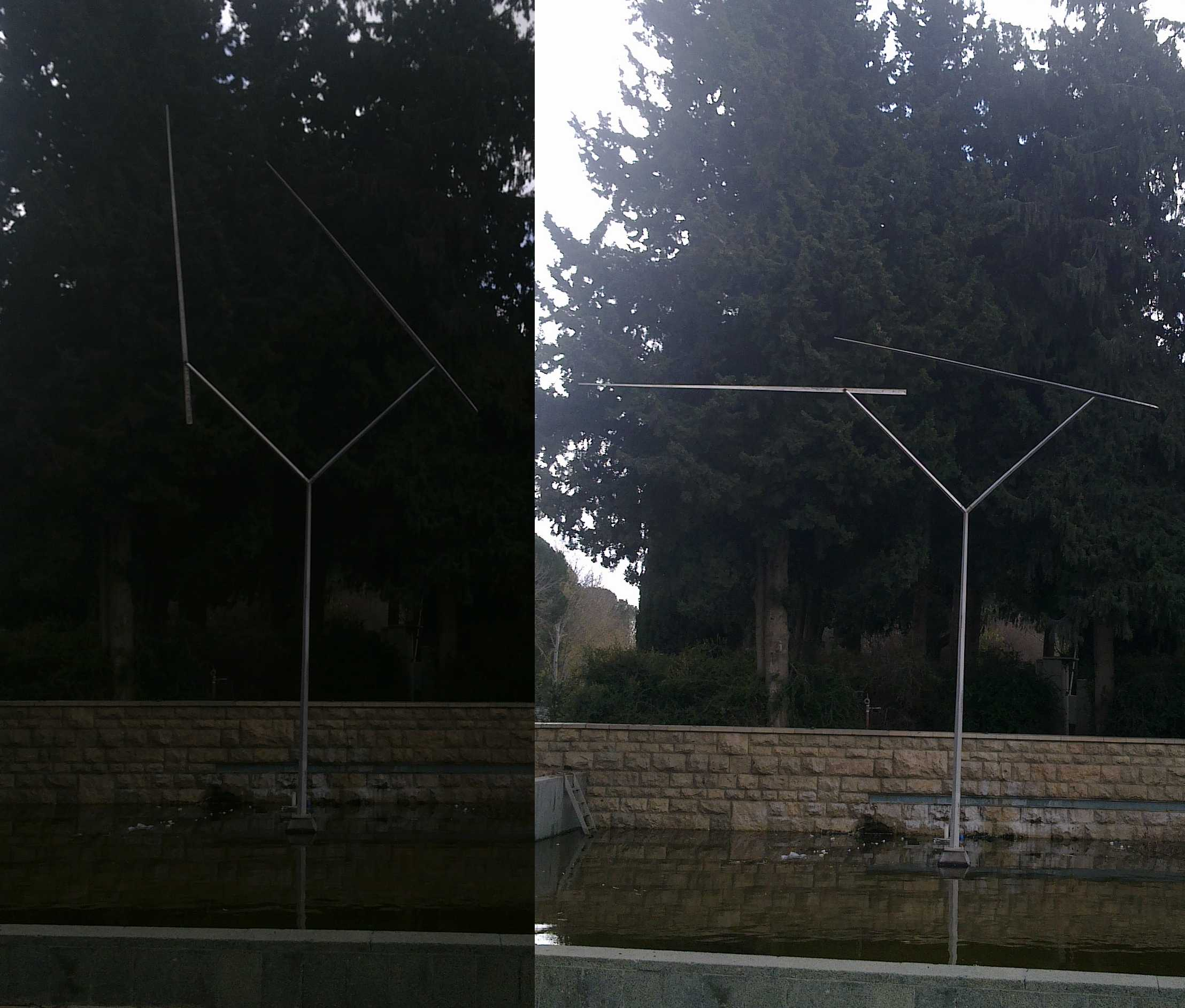 kinetic scupture in Givat Ram Jerusalem. Same place, one minute differance.